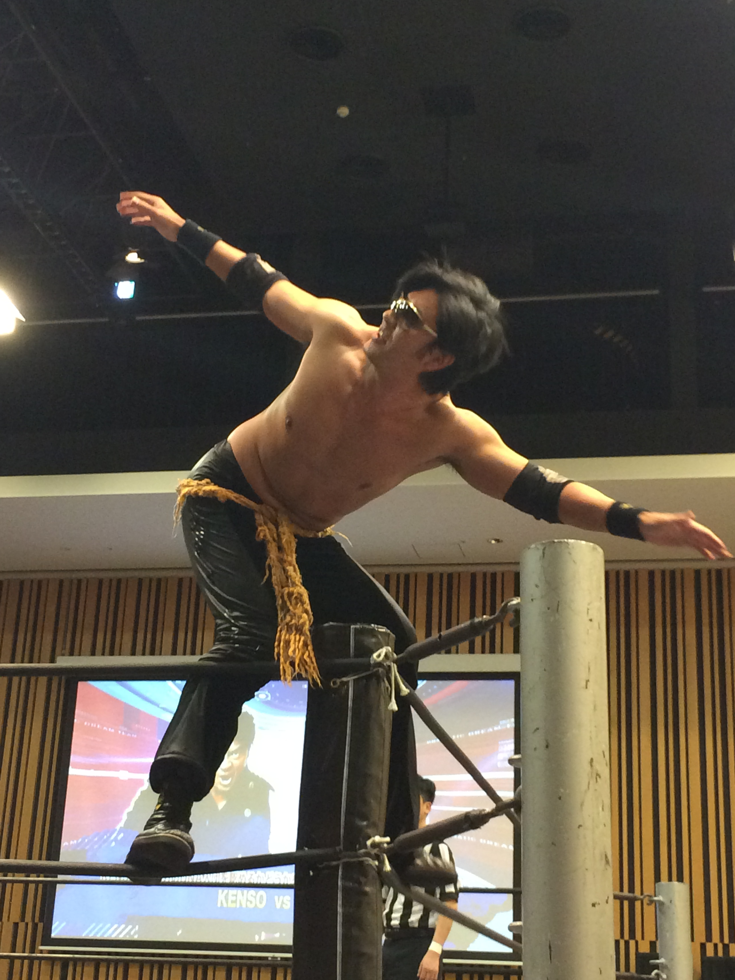 20160402春日部